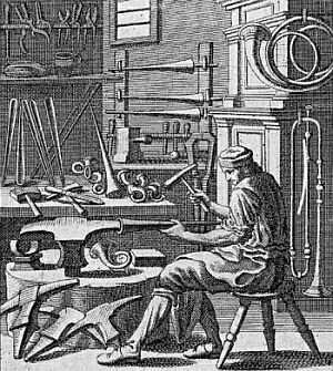 historischer Trompetenbauer